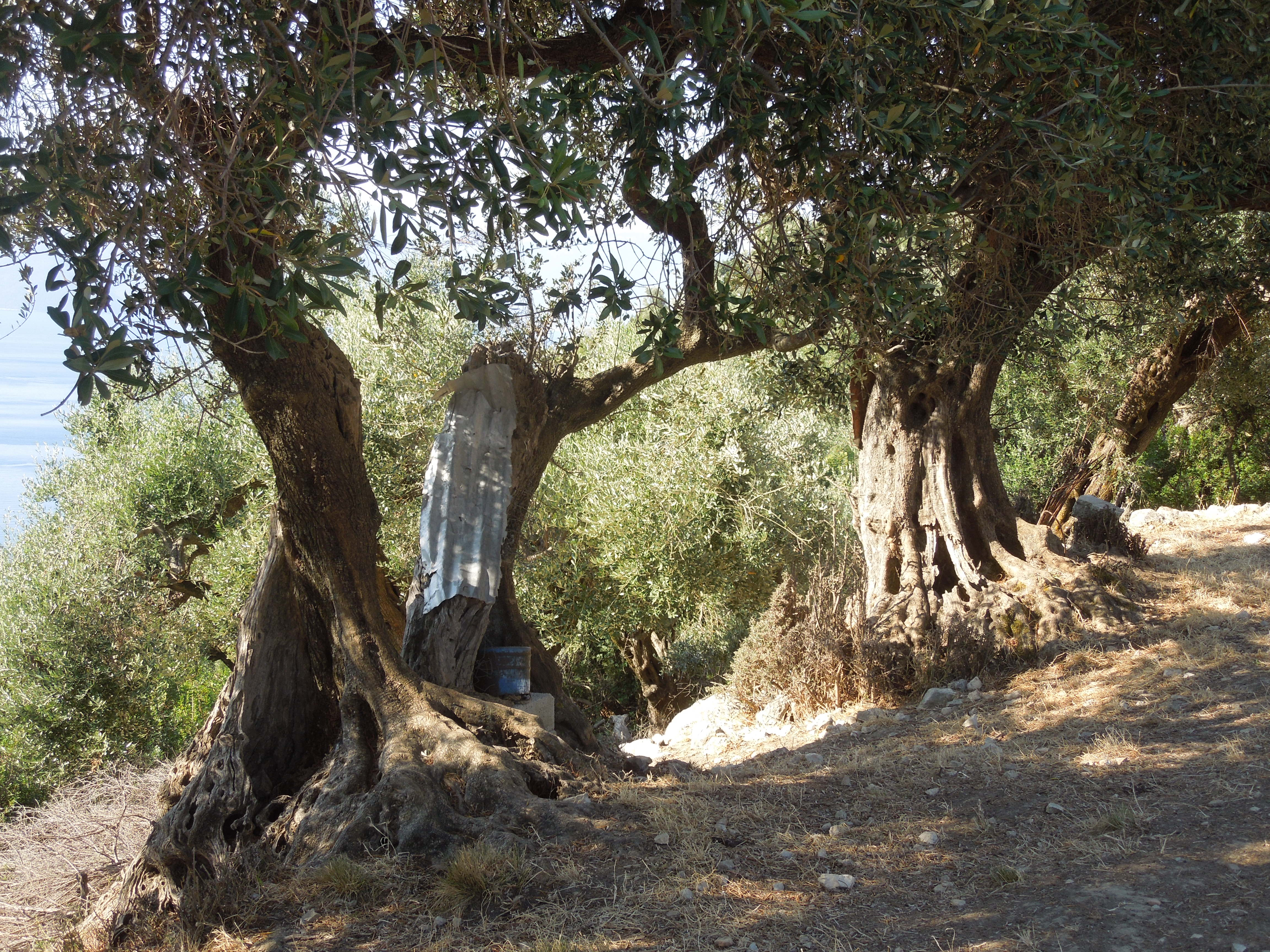 Uralte Olivenbäume bei Alalkomenai auf Ithaka